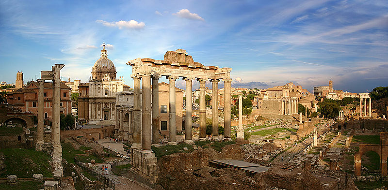 Вид на развалины Римского Форума. Фото передано в общественное достояние